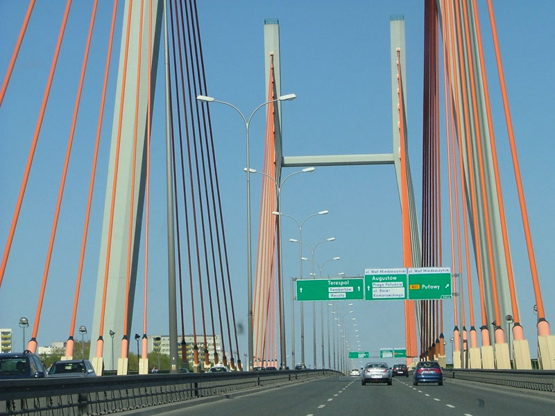 PL, Warsaw, Poland, Most Siekierkowski